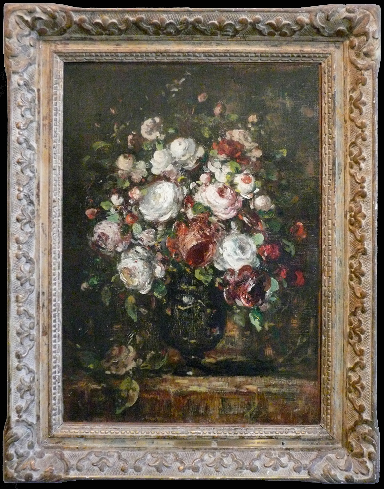 Bouquet